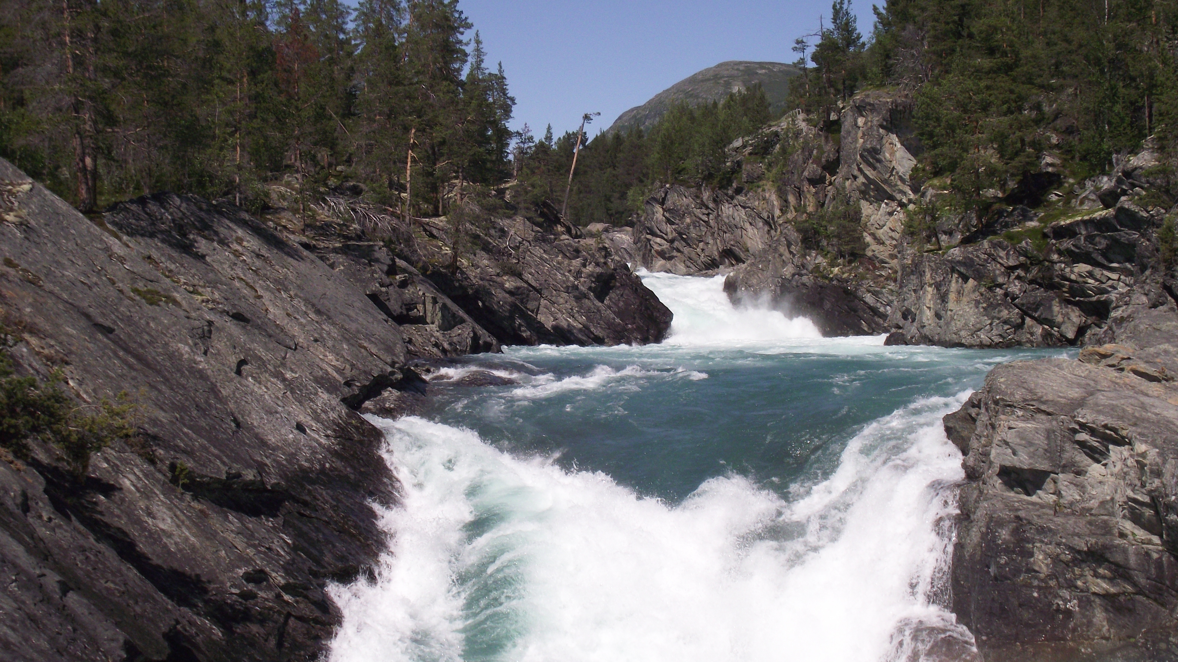 Pollfoss, Framruste, Oppland